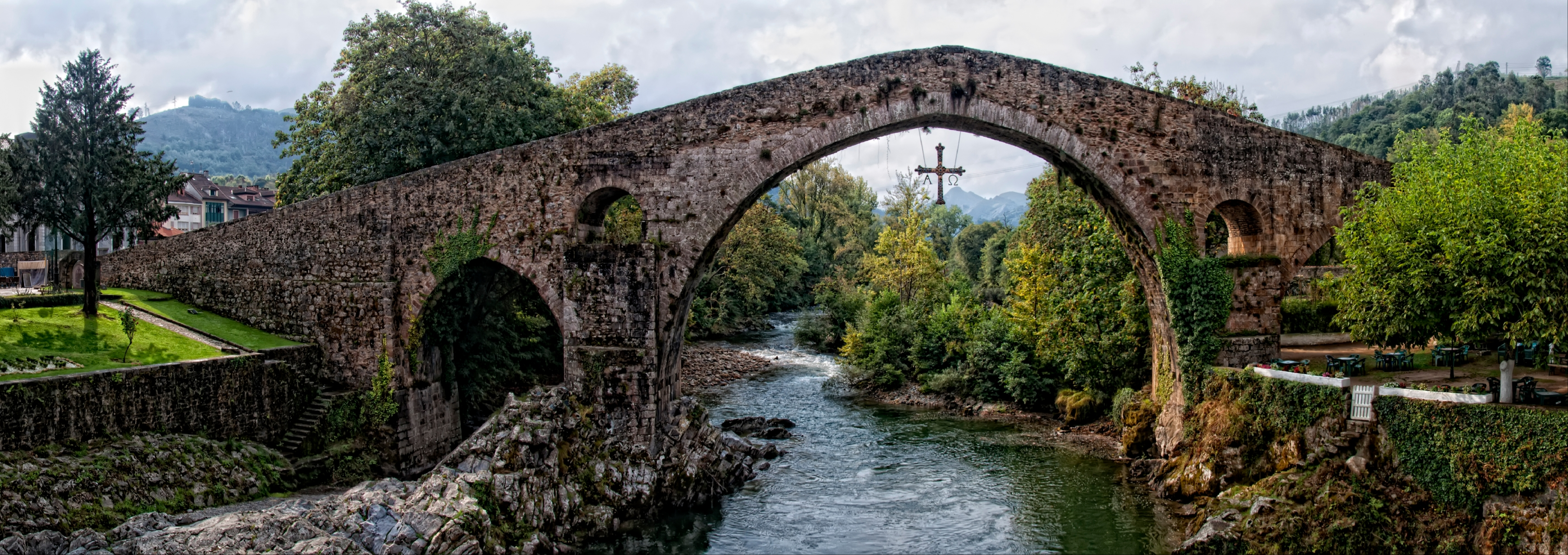 Río Sella This is a photography of a Special Area of Conservation in Spain with the ID: ES1200032. Natura2000 entry, EEA entry